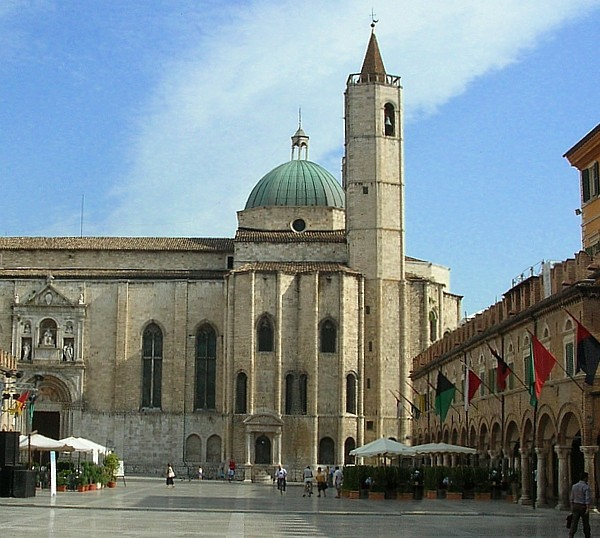 Kaart van provincie Ascoli Piceno